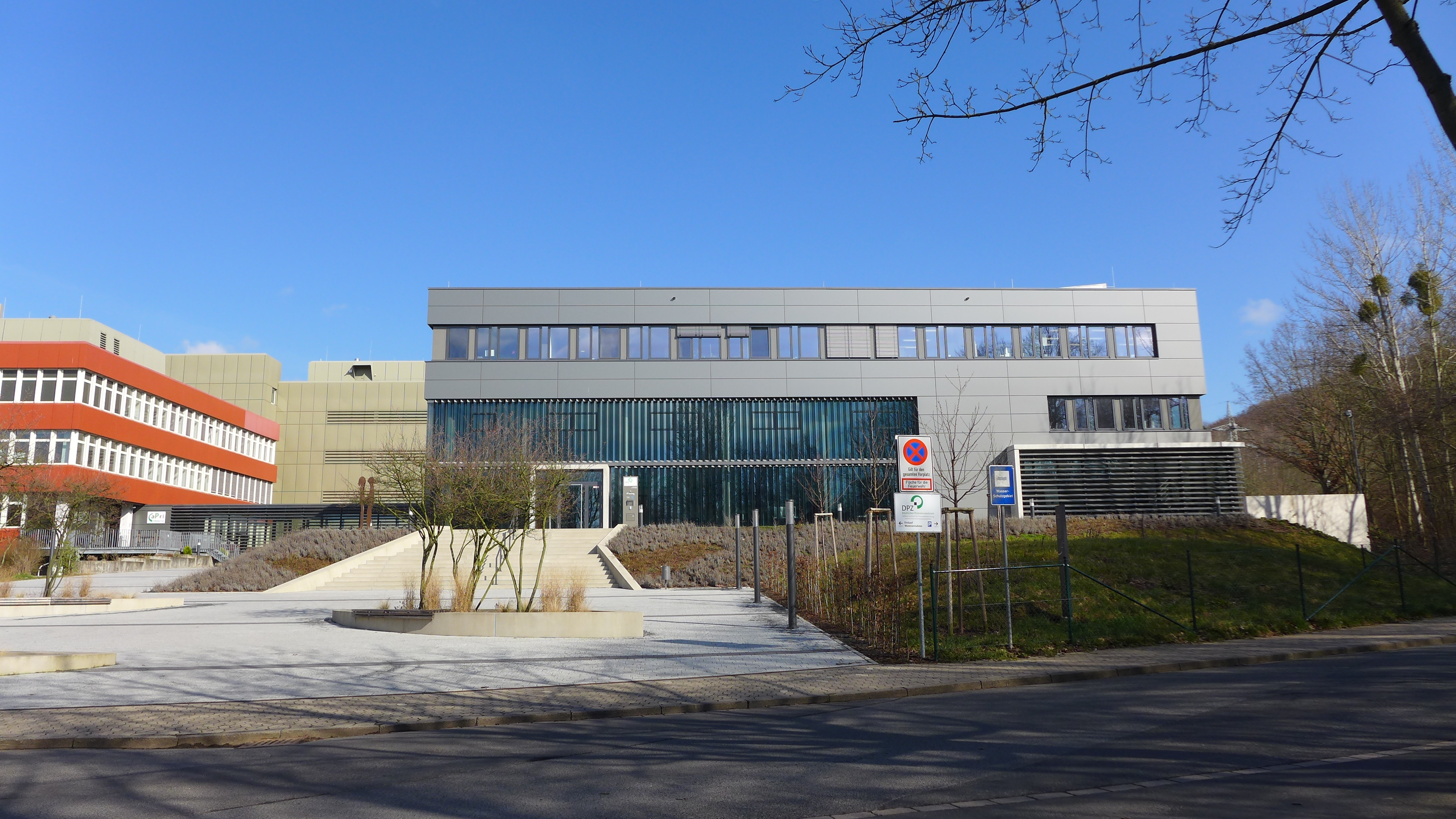 DPZ Haupteingang